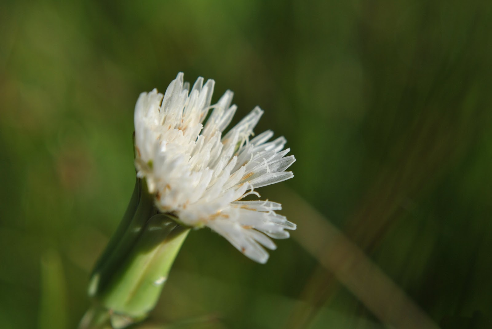 Picrosia longifolia. Asteraceae. Fotos tomadas sobre suelo arenoso húmedo al margen del Lago de Palmar, departamento de Soriano, Uruguay.